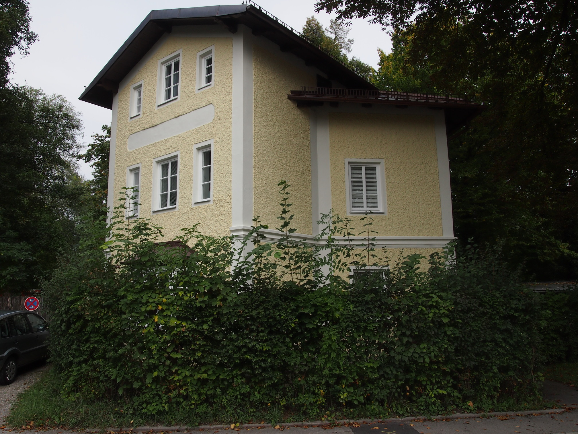 Villa München Thalkirchen Benediktbeuerer Straße 7This is a photograph of an architectural monument.